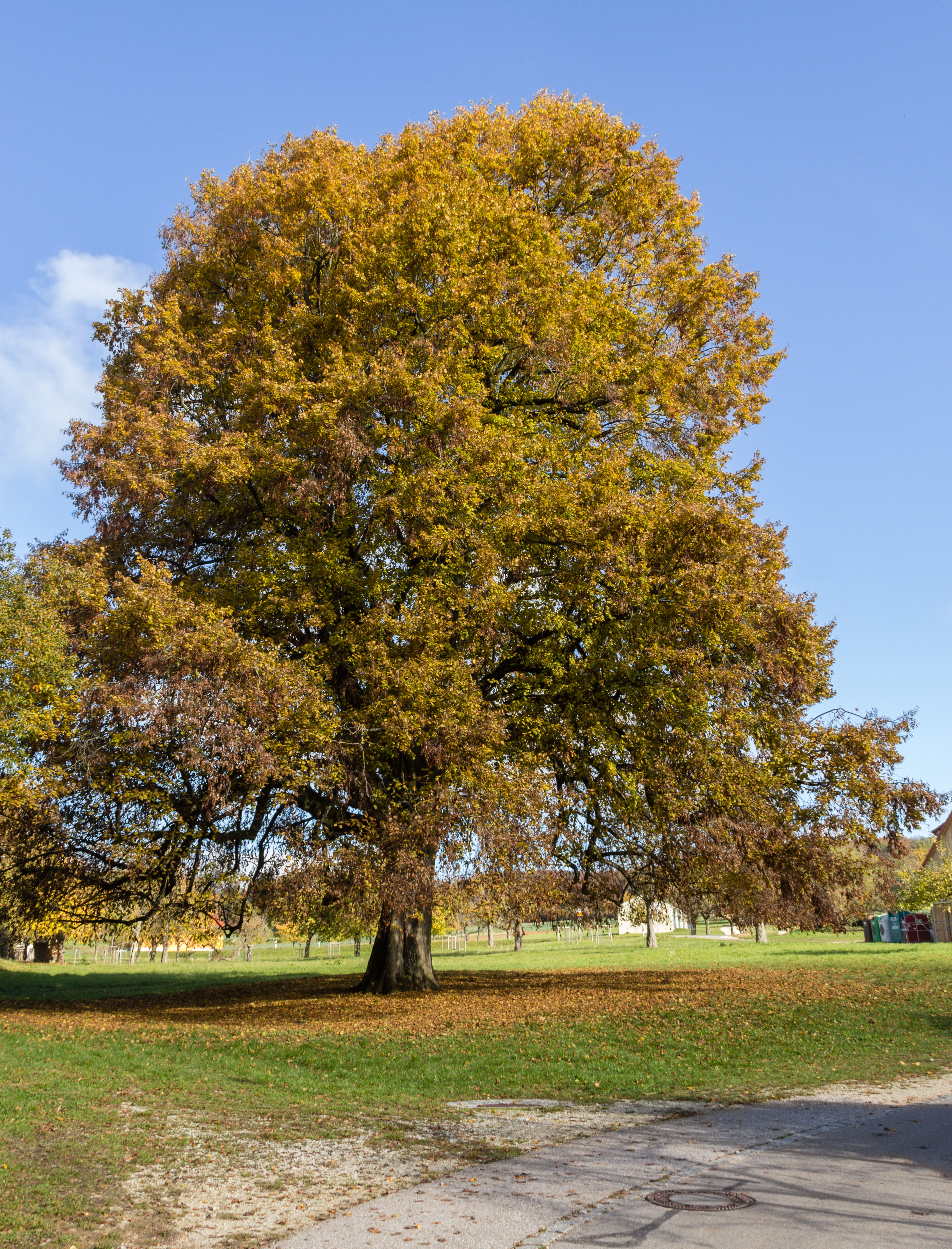 Deckerberger Linde, Deckersberg, Happurg, Naturdenkmal